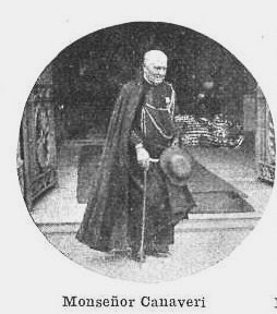 Sacerdote argentino (foto 1908)